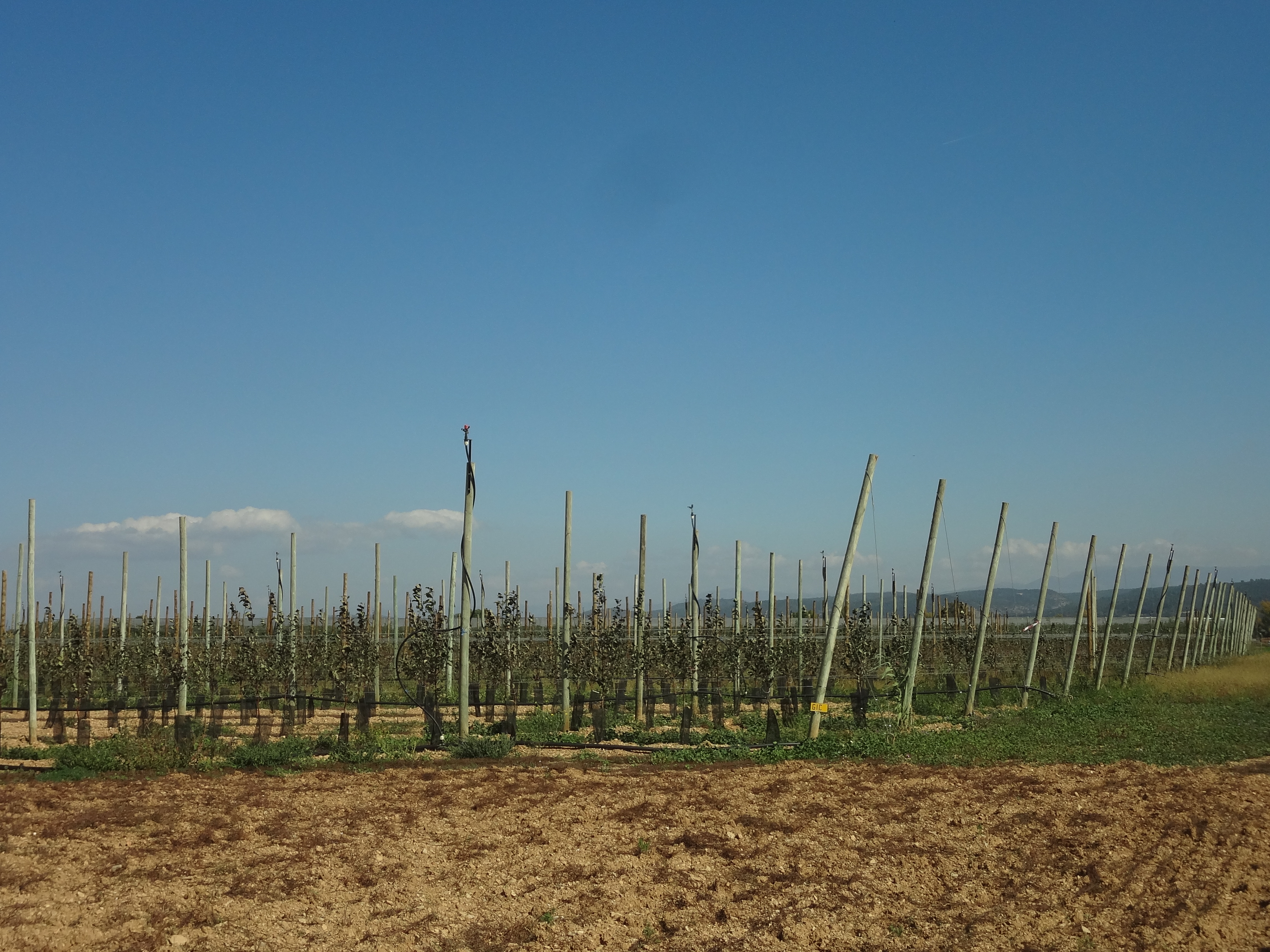 Pommeraie en culture intensive à Manosque